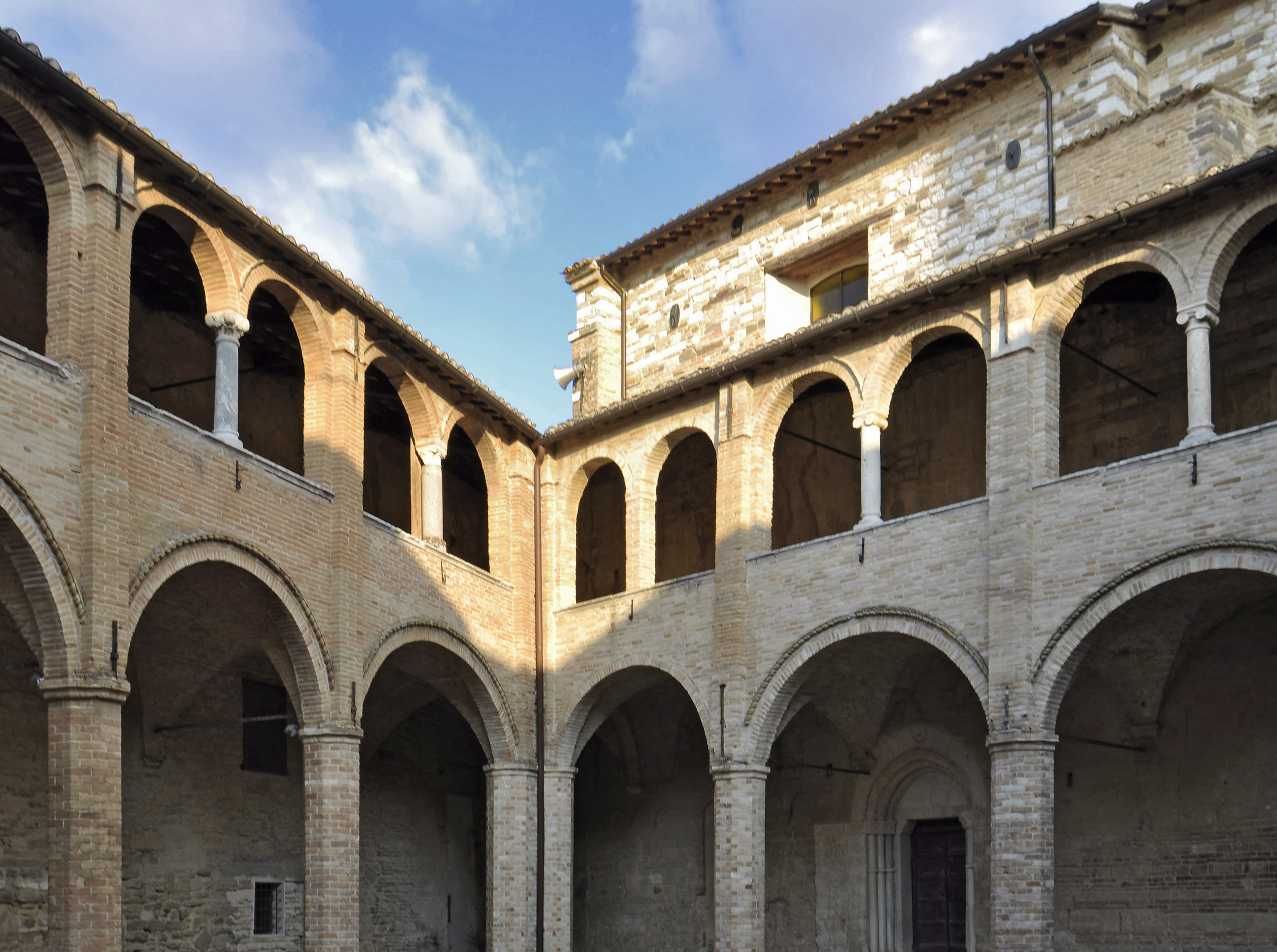 San Severino Marche, Chiostro di Castello al Monte This is a photo of a monument which is part of cultural heritage of Italy.